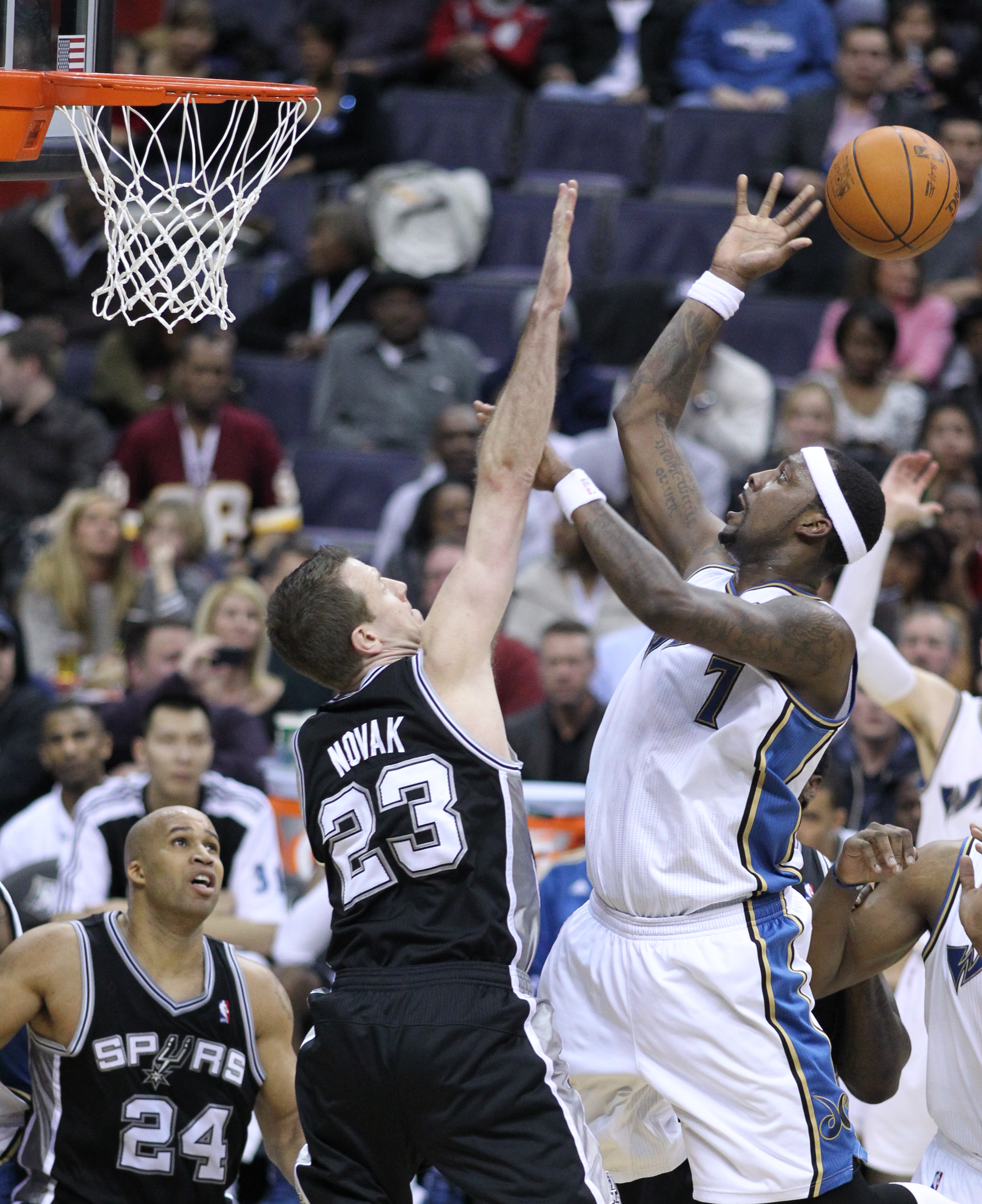 Wizards v/s Spurs 02/12/11